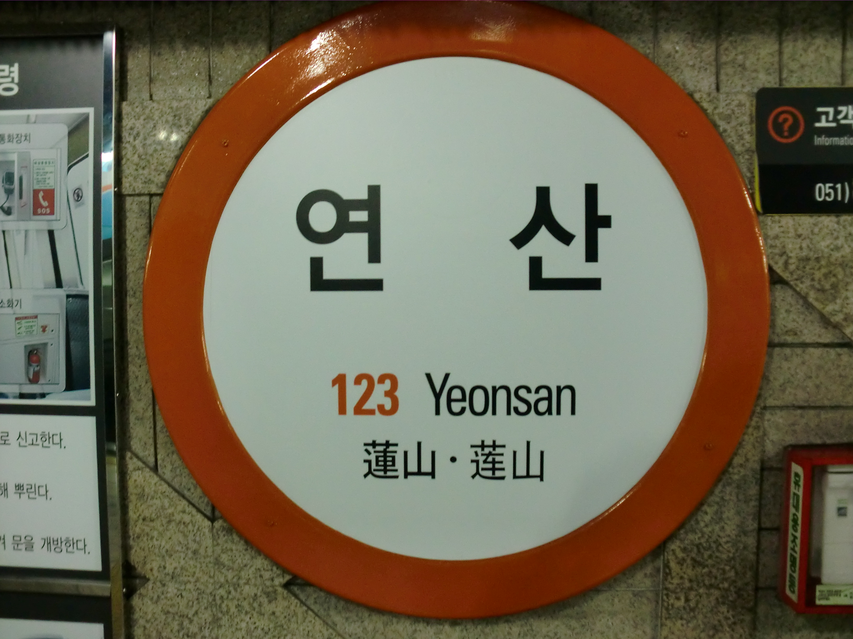 부산도시철도1호선 연산역의 역명판